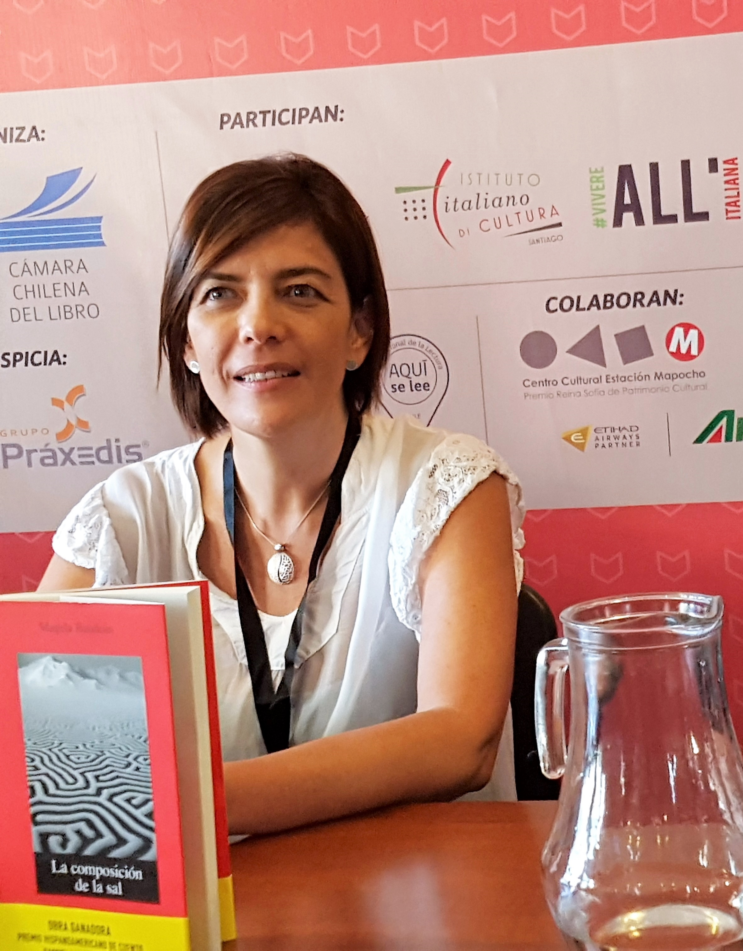 La escritora boliviana Magela Baudoin en la Feria Internacional del Libro de Santiago 2017.